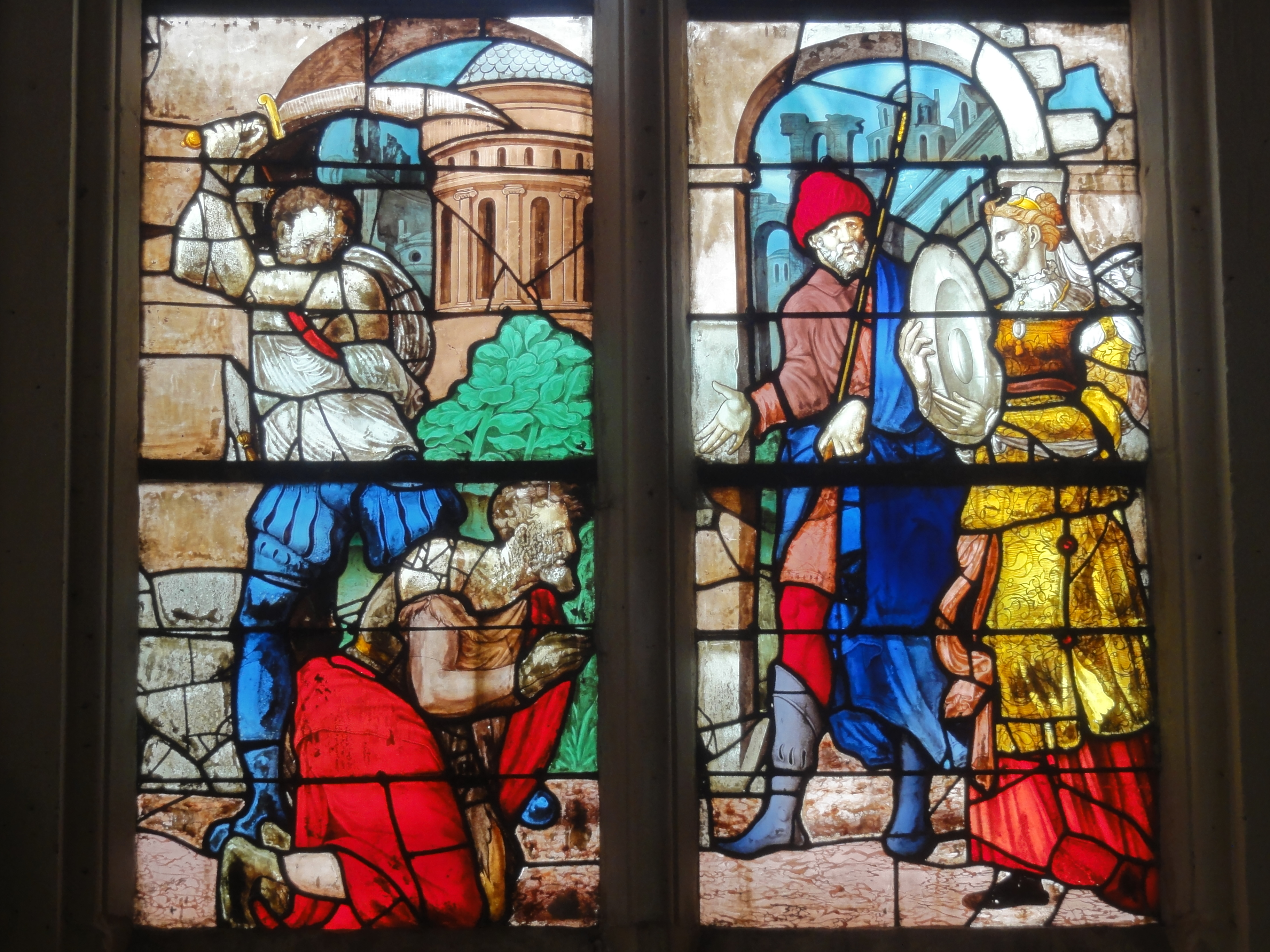 Verrière de l'église - voir titre.